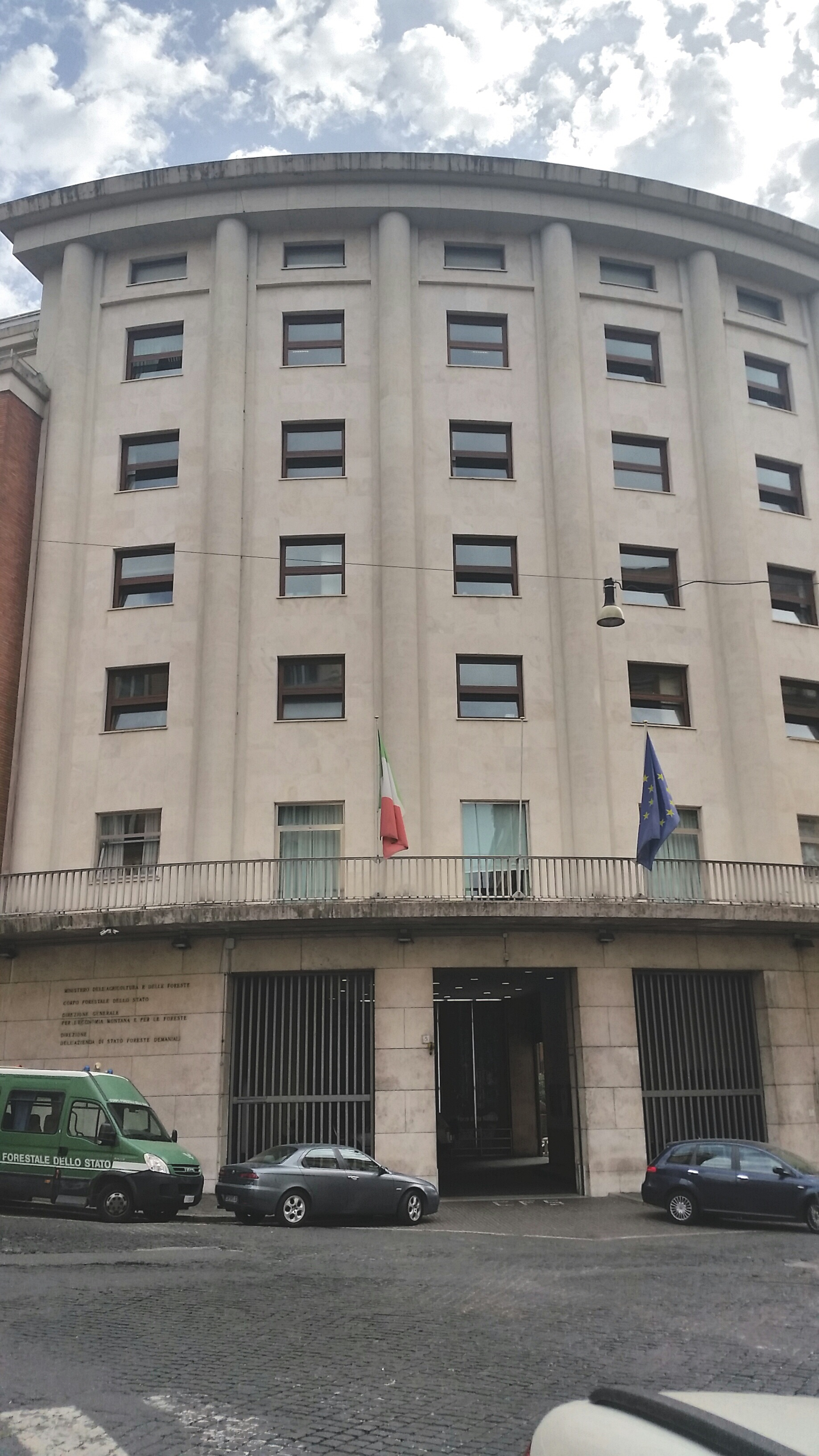 Ispettorato Generale del Corpo Forestale dello Stato, Sede centrale del corpo. Dal 1º gennaio 2017 del Comando unità Carabinieri per la tutela forestale, a Roma